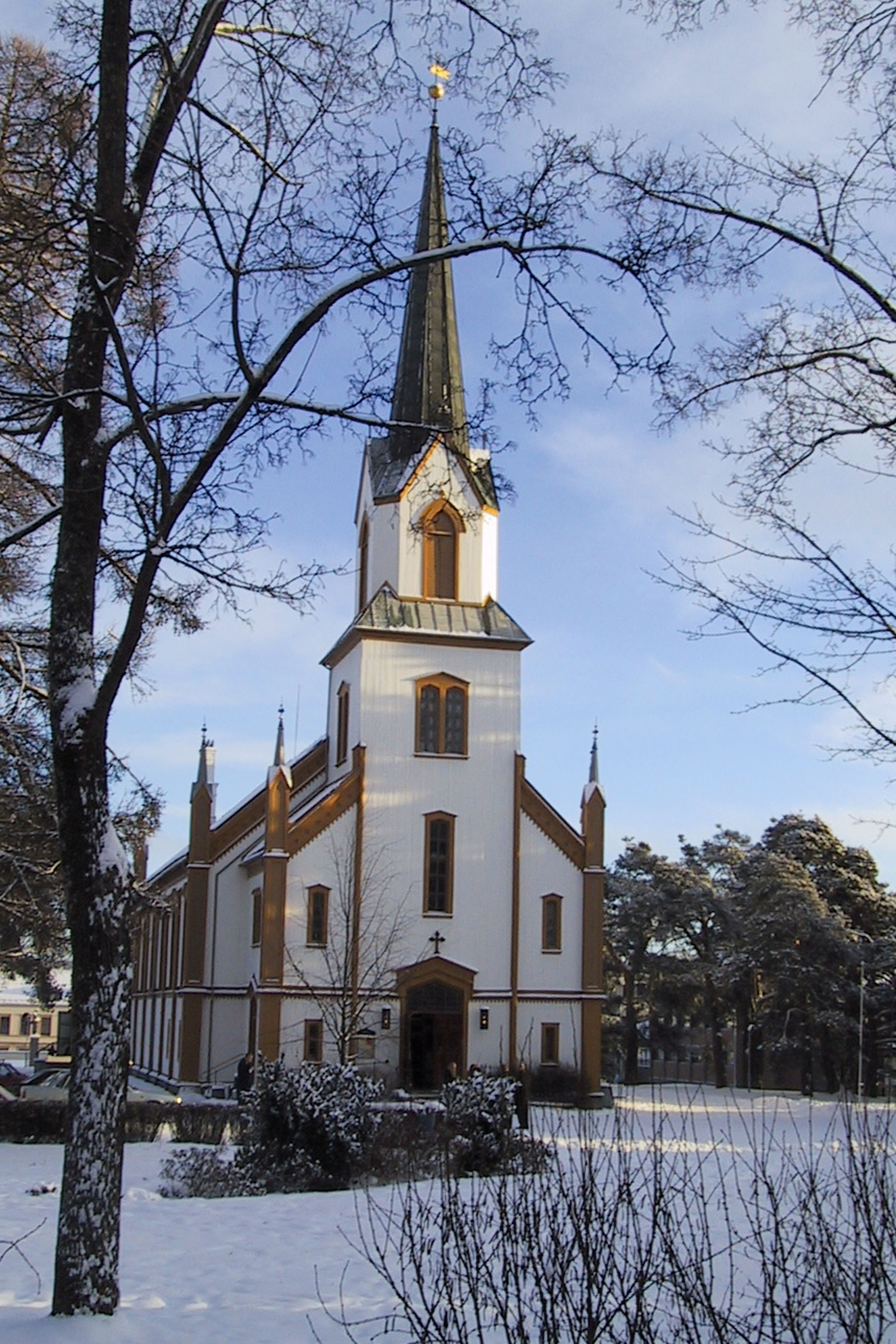 Gjøvik kirke i Oppland, Norway